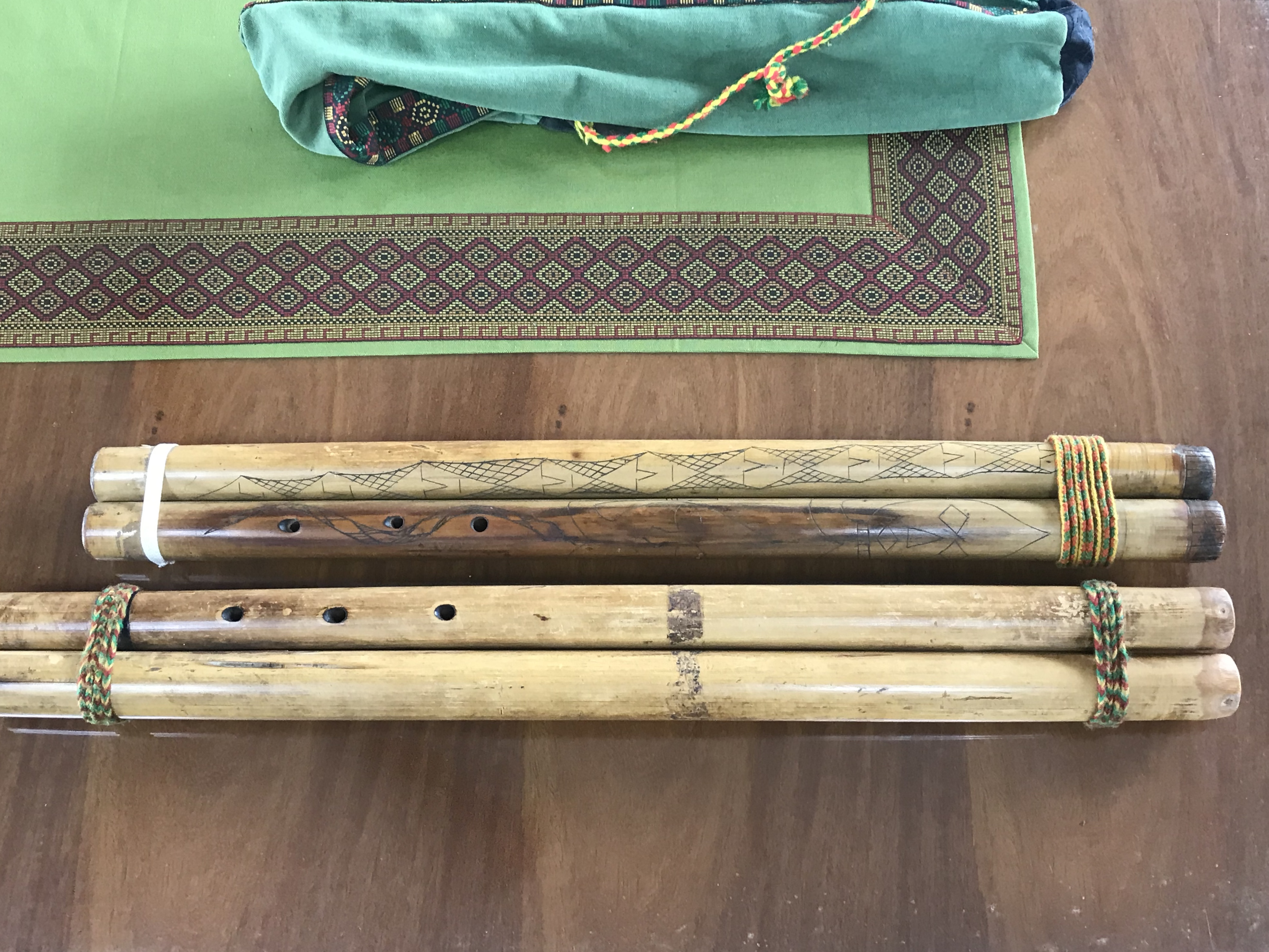 中文（台灣）: 排灣族雙管鼻笛